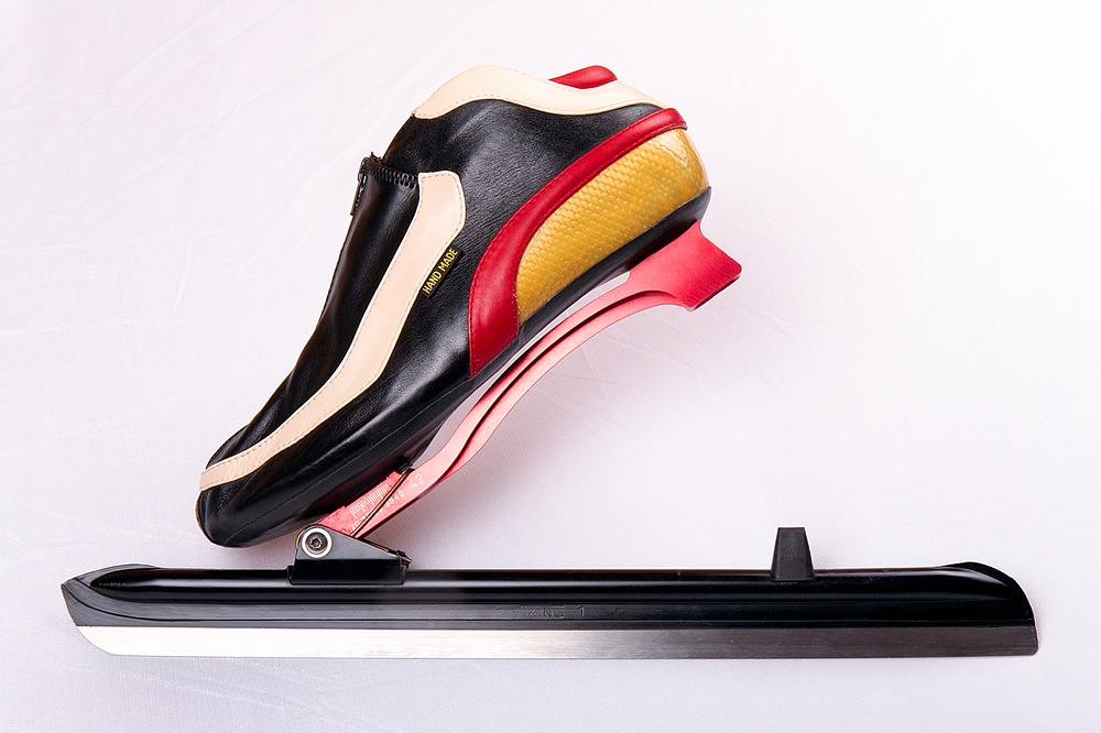 конькобежные коньки клапы, speed skating clap skate